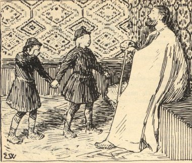 Ingjald og Gautvid hos Svipdag Blinde